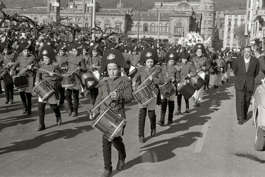 Título original: Tamborrada de San Sebastián (59/93) Localización: San Sebastián (Guipúzcoa)